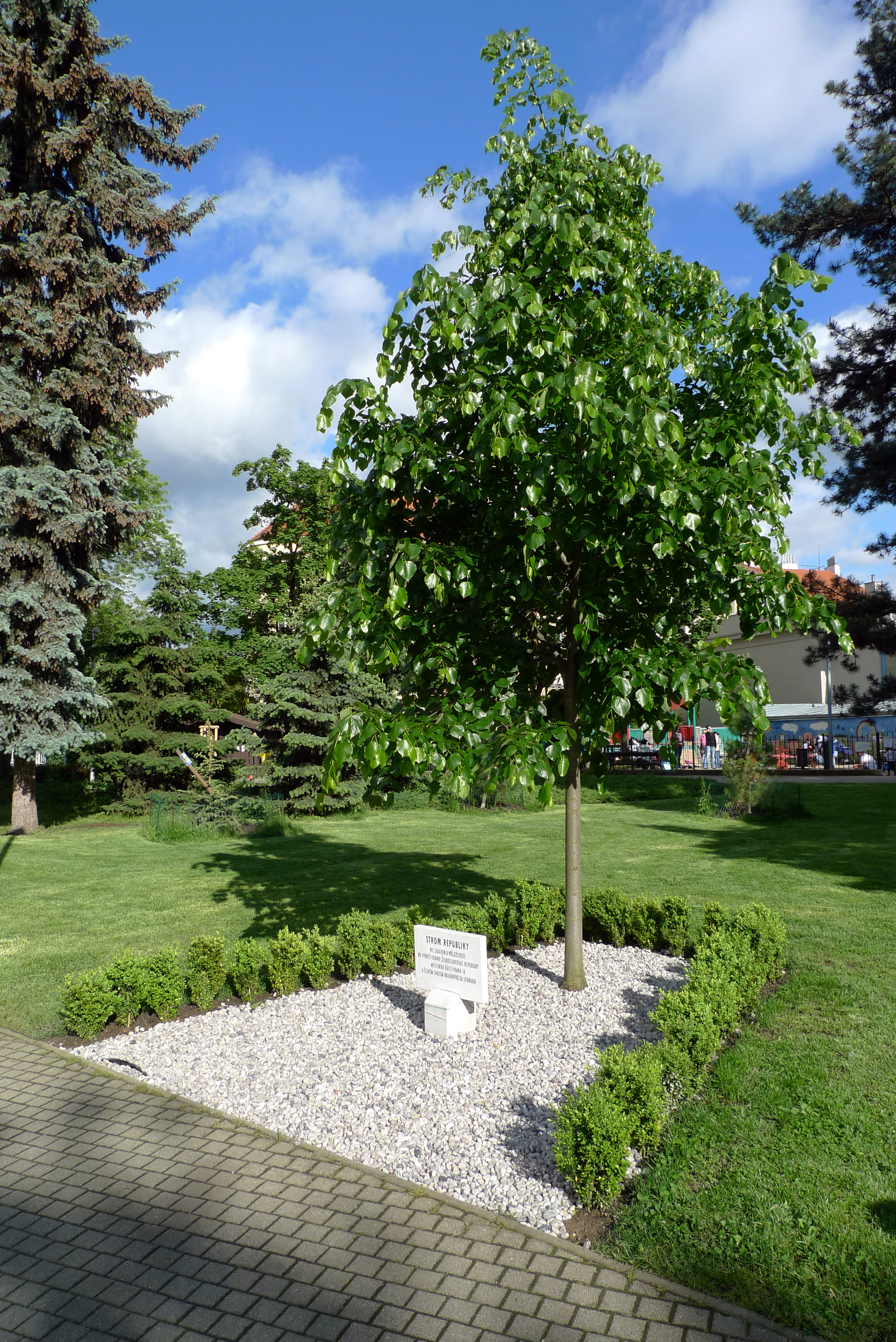 Heroldovy sady v Praze 10-Vršovicích - lípa Republiky.